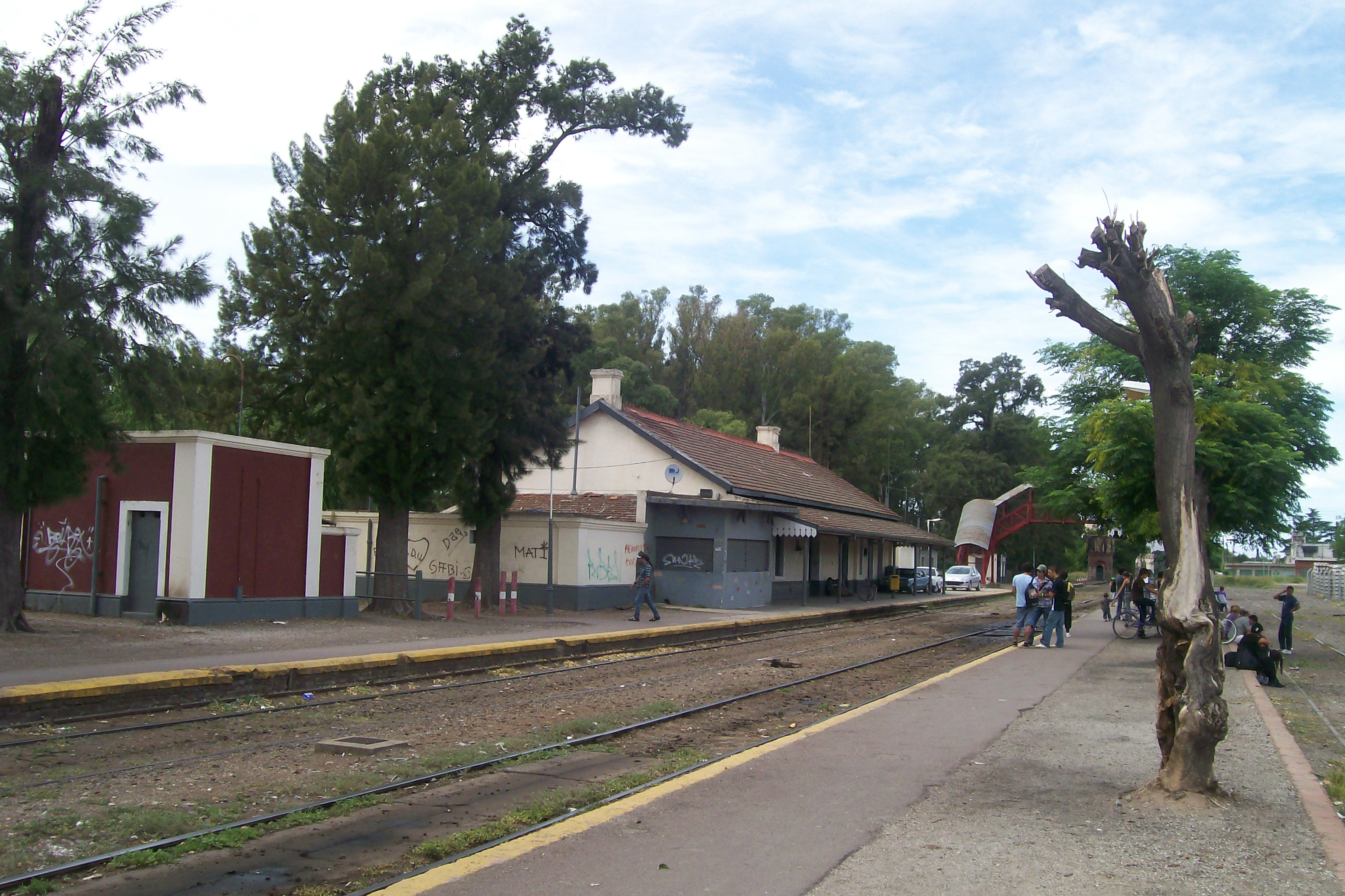 Estación de tren de Zárate (FFCC Mitre)